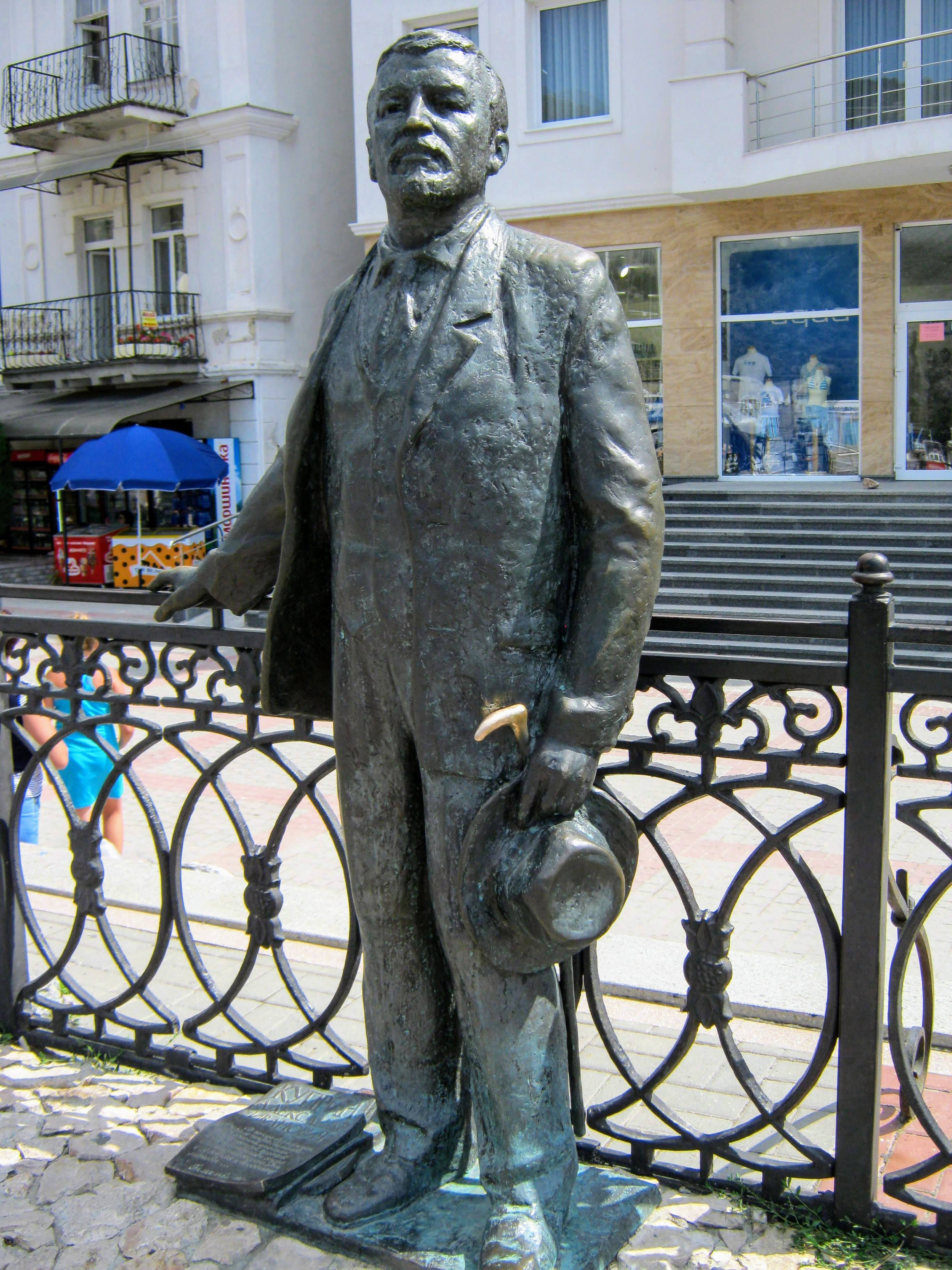 Готель «Гранд-отель»,1887 – 1900, в якому зупинялися російські письменники Бунін І. О., 1889, 1896, Купрін О. І., Севастополь, Набережна Назукіна, 3